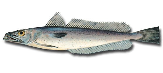 Foto de merluza hubbisi